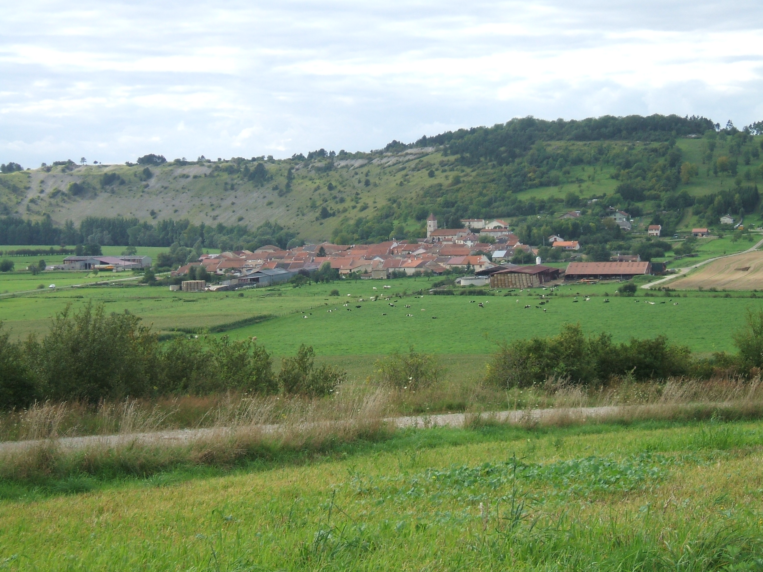 Vue sur le village de Pagny-la-Blanche-Côte.